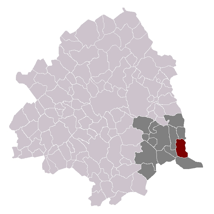 Bachy dans son canton et son arrondissement